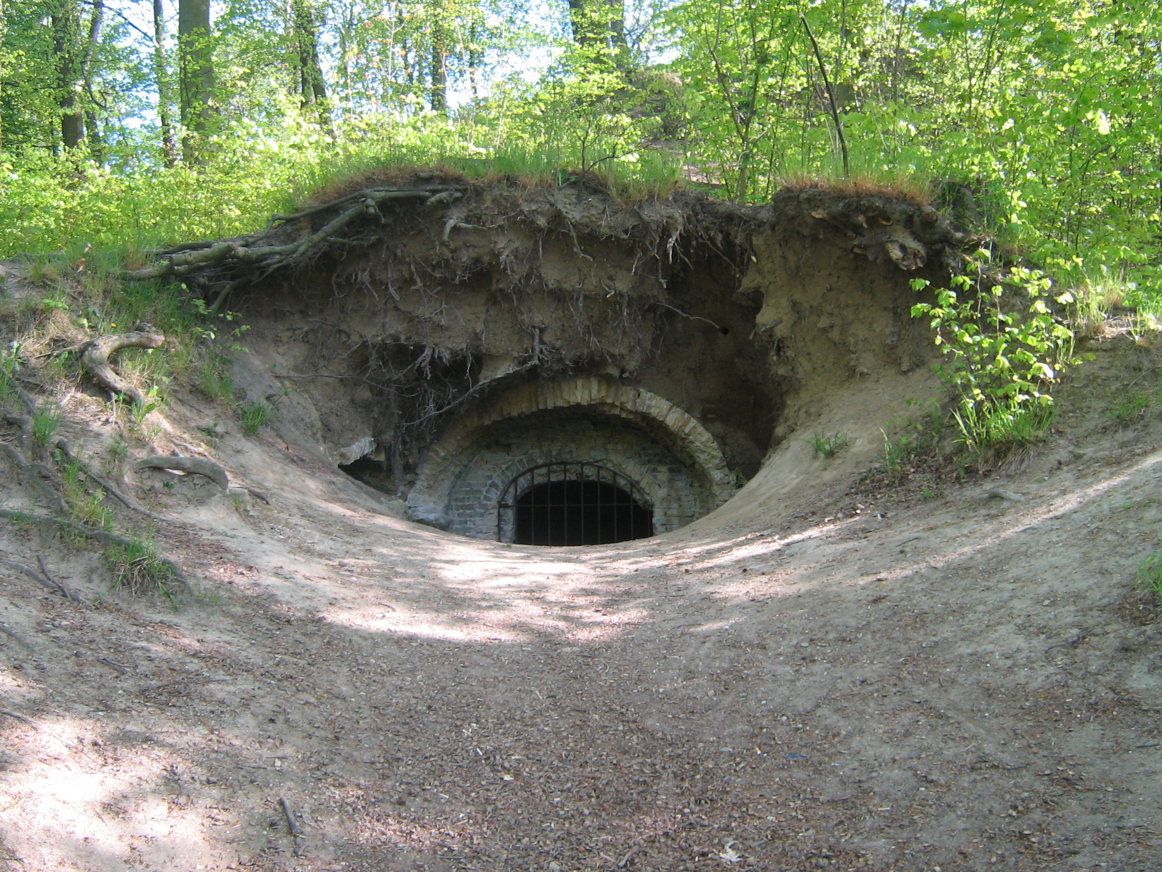 Gdańsk Orunia. Lodownia w Parku Oruńskim.